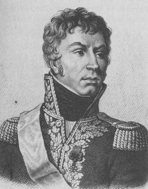 Generał Jean Louis Ebenezer Reynier